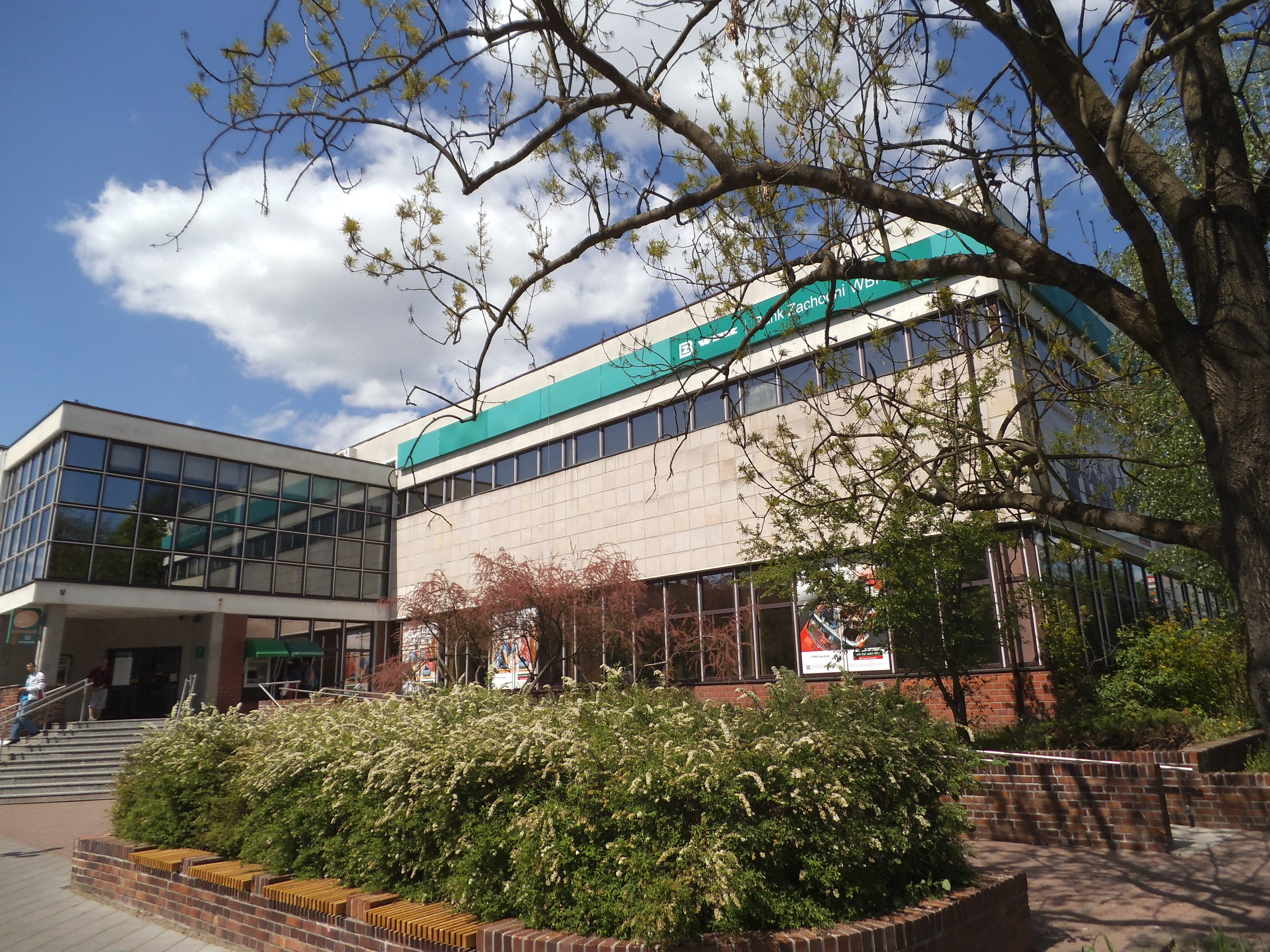 bank w toruniu